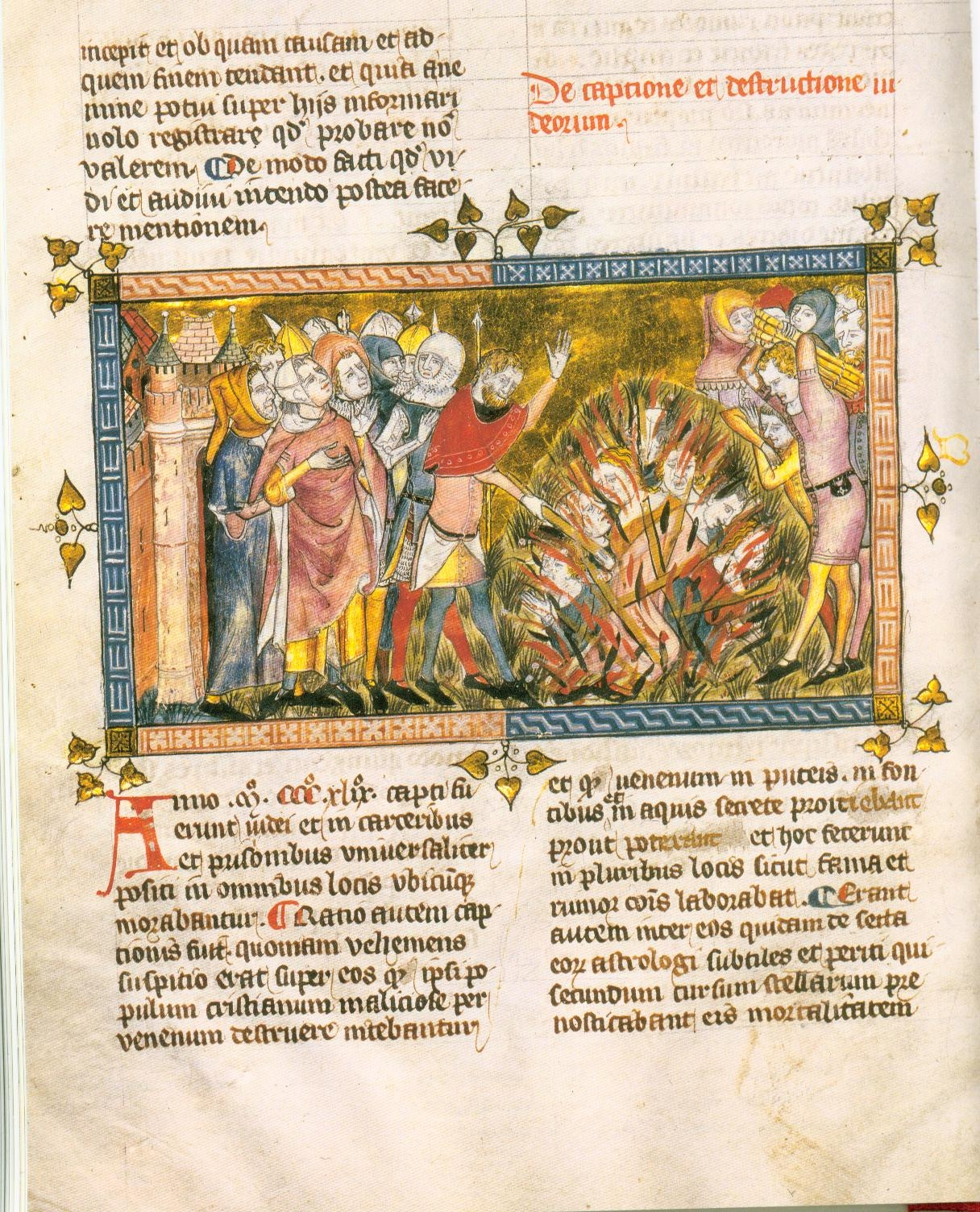 Hinrichtung von Juden, um 1350, Chronik von Gilles Li Muisis, MS 13076-77, fol. 12v Bibliothèque Royale de Belgique, Brüssel.